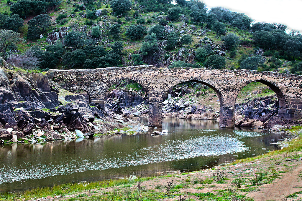 Puente Rivera Fresnedosa Antiguo